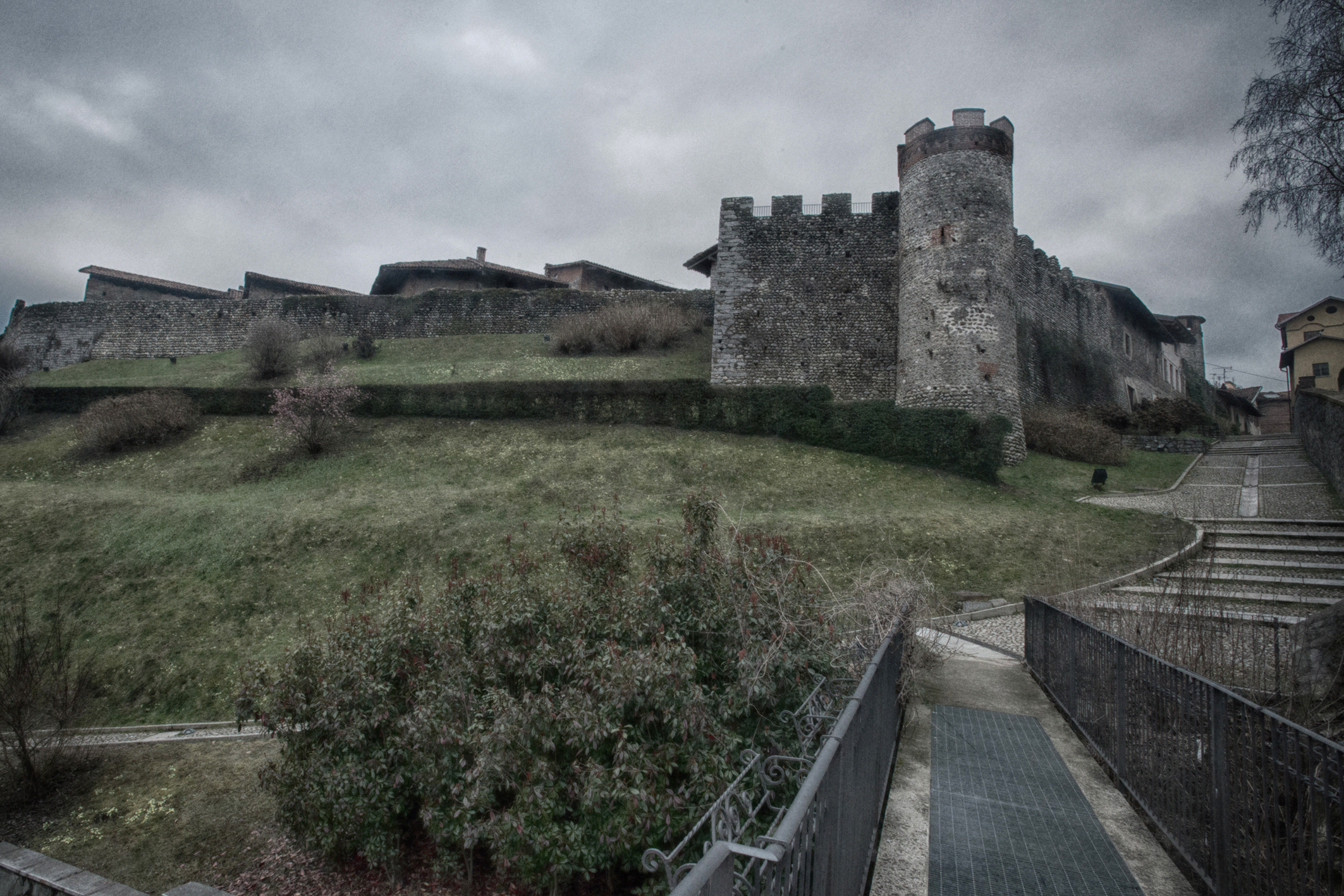 Ricetto medievale di Candelo (spazi esterni dentro e fuori le mura) This is a photo of a monument which is part of cultural heritage of Italy.